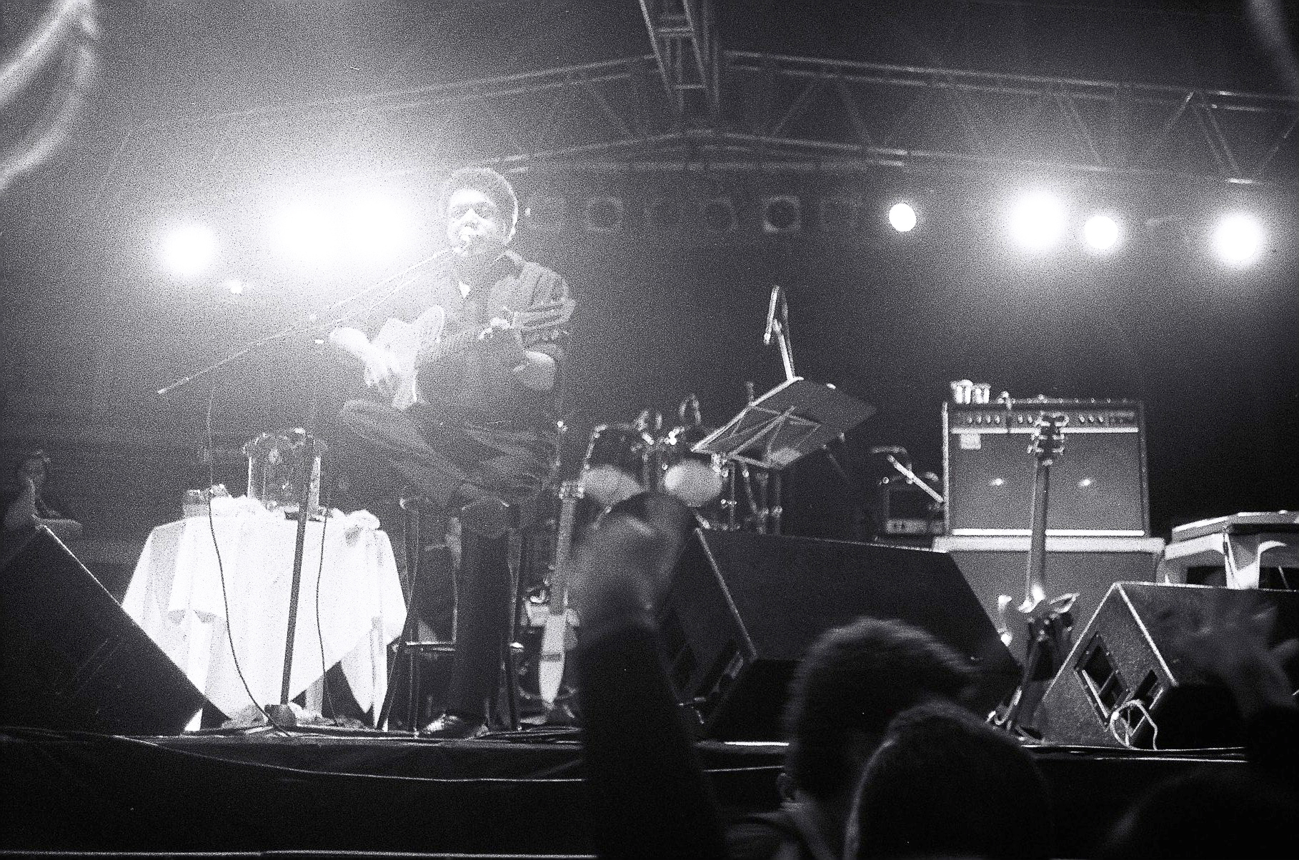 Cantor brasileiro Wando durante uma apresentação em 2009.